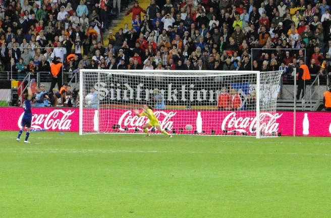 Penalty vainqueur de Saki Kumagai lors de la finale de la Coupe du Monde 2011.